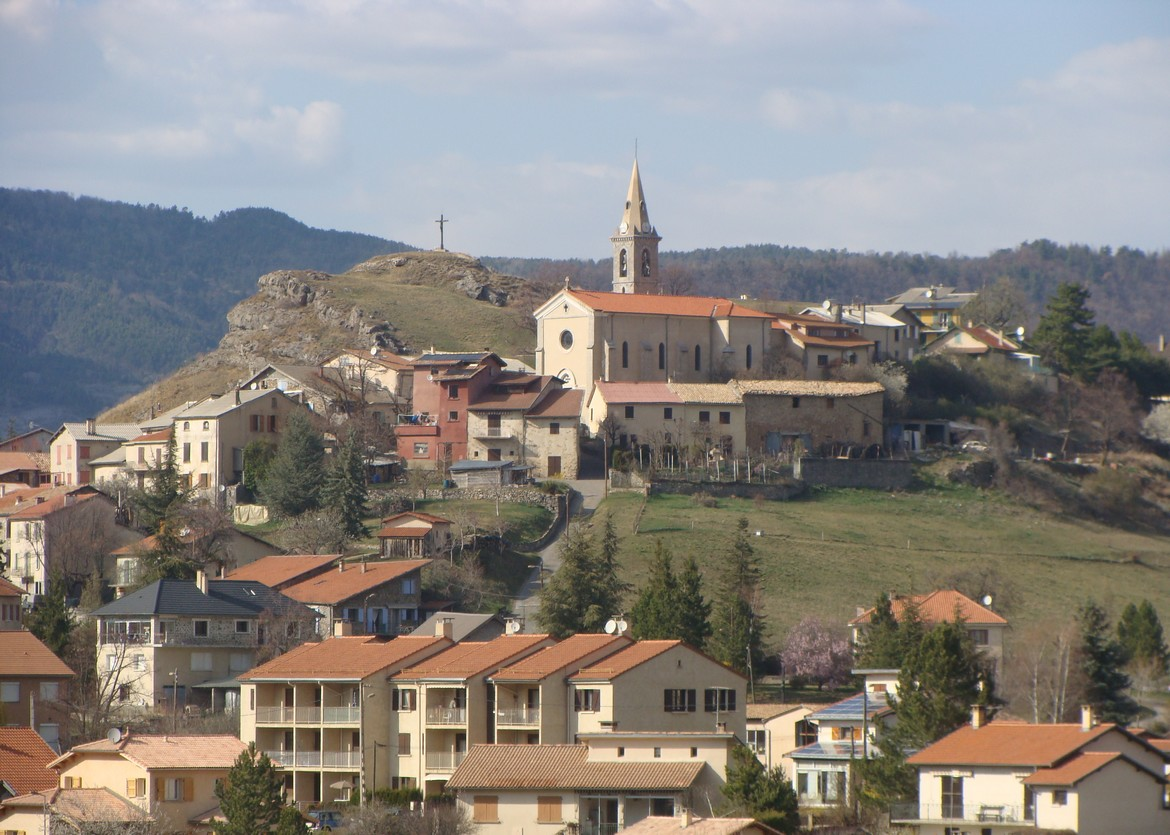 Le village de Turriers (Alpes-de-Hautes-Provence), vu du sud.